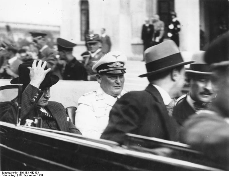 Frankreichs Ministerpräsident mit Generalfeldmarschall Göring auf der Fahrt durch München. Nach der ersten Besprechung im Führerbau in München begleitete Generalfeldmarschall Hermann Göring den französischen Ministerpräsidenten Daladier im Kraftwagen zu dessen Hotel. Daladier und Göring waren Mittelpunkt lebhafter und herzlicher Kundgebungen der Tausende, die die Strassen umsäumten. UBz.: Ministerpräsident Daladier und Generalfeldmarschall Göring auf der Fahrt durch München. Scherl Bilderdienst, Berlin 29.9.39 II. TEXT ADN-ZB/Archiv Faschistisches Deutschland1933-1945 Unter dem Namen "Münchener Abkommen" wurde am 29.9.1938 in München von A.N. Chamberlain (Großbritannien), E. Daladier (Frankreich), A. Hitler (Deutschland) und B. Mussolini ein Vertrag unterzeichnet. Dieser ermächtigte das faschistische Deutschland zur Annexion tschecheslowakischer Grenzgebiete ( vom 1. bis 10.10.1938). Der französische Ministerpräsident Daladier (links) und der deutsche Generalfeldmarschall Göring (rechts daneben) auf der Fahrt durch München.